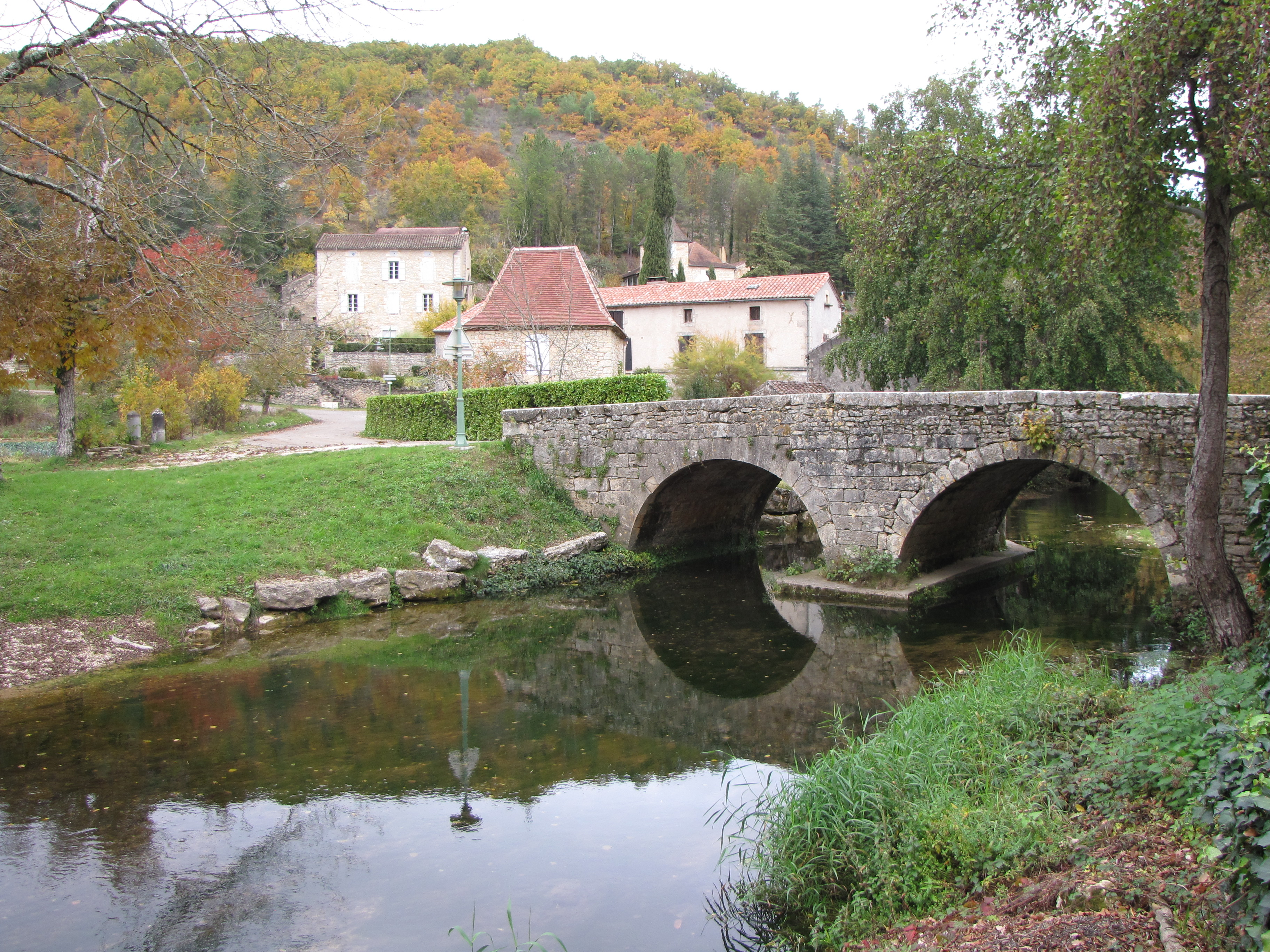 Labastide-du-Vert le vieux pont sur le Vert